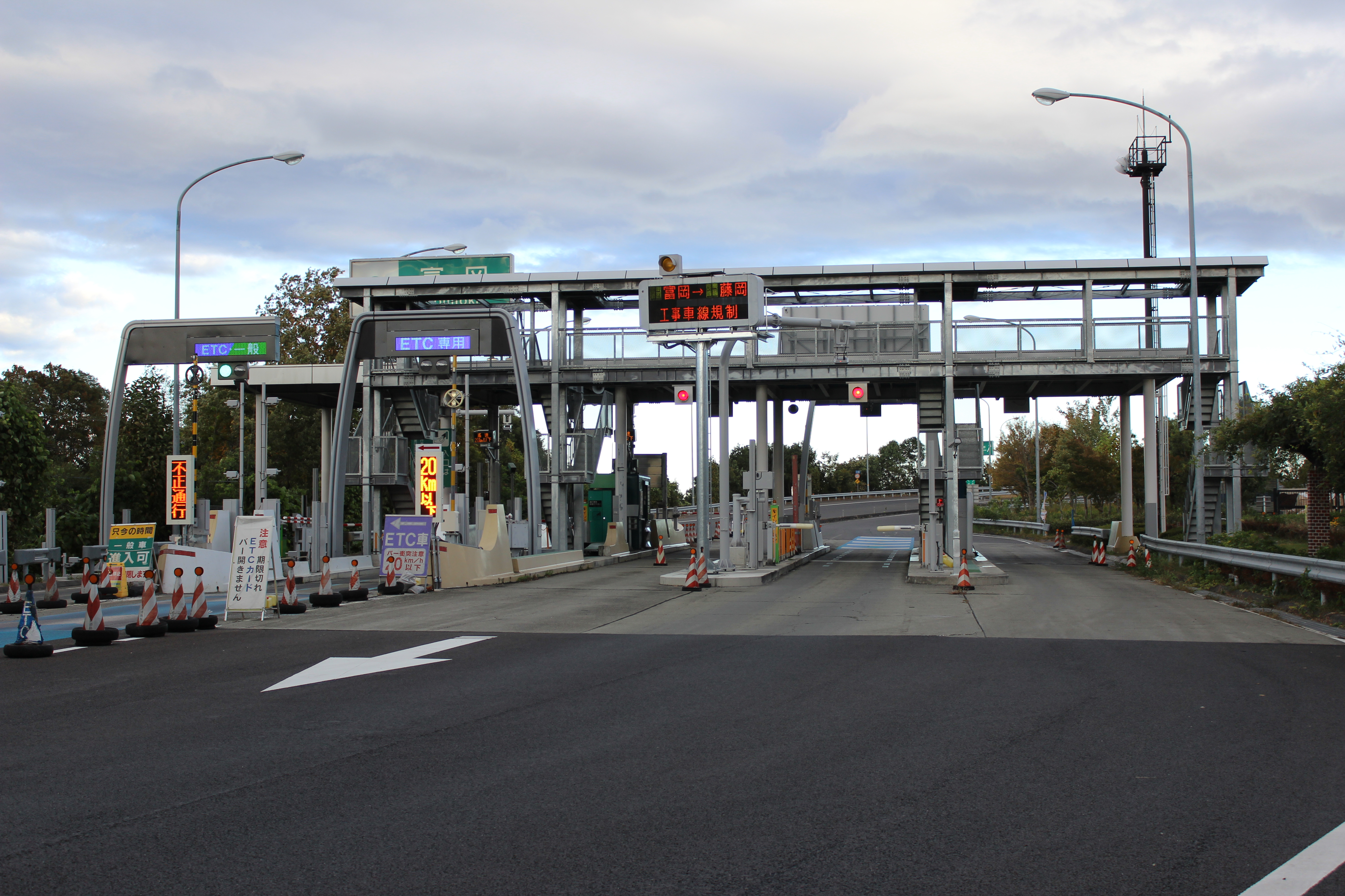 上信越自動車道富岡インターチェンジ料金所。